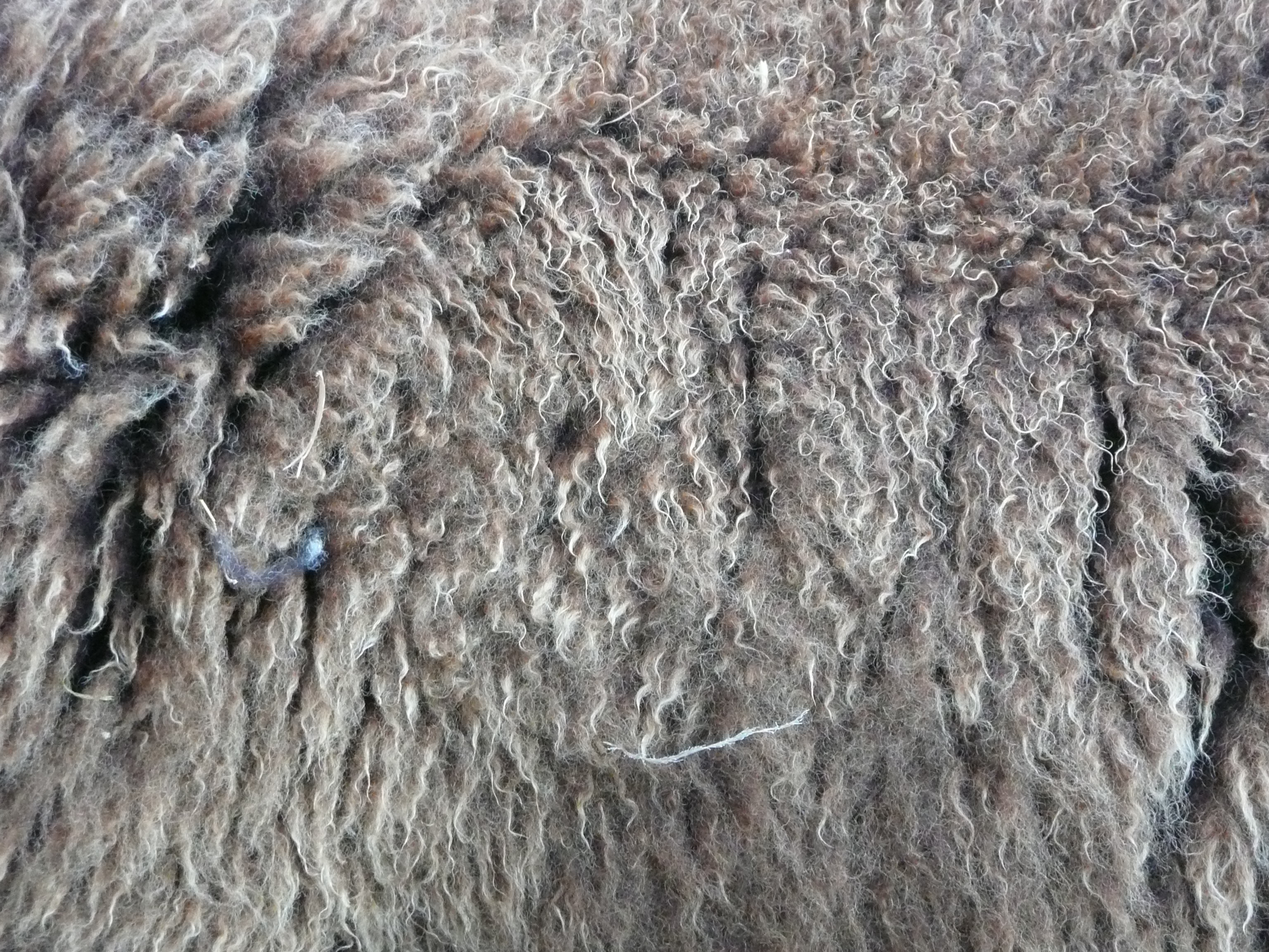 Ouessant Schafe oder Bretonische Zwergschafe, fotografiert in Heidelberg (Baden-Württemberg, Deutschland)